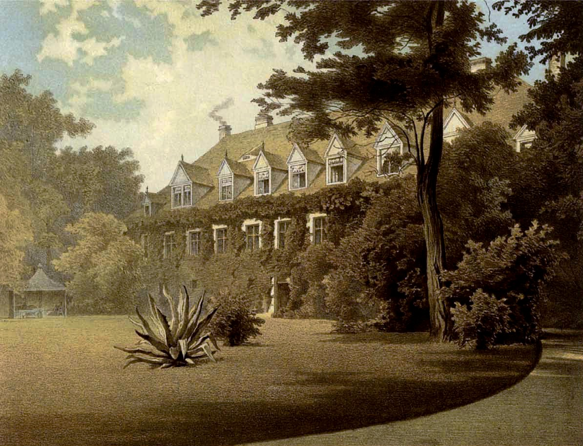 Schloss Jänkendorf, Kreis Rothenburg